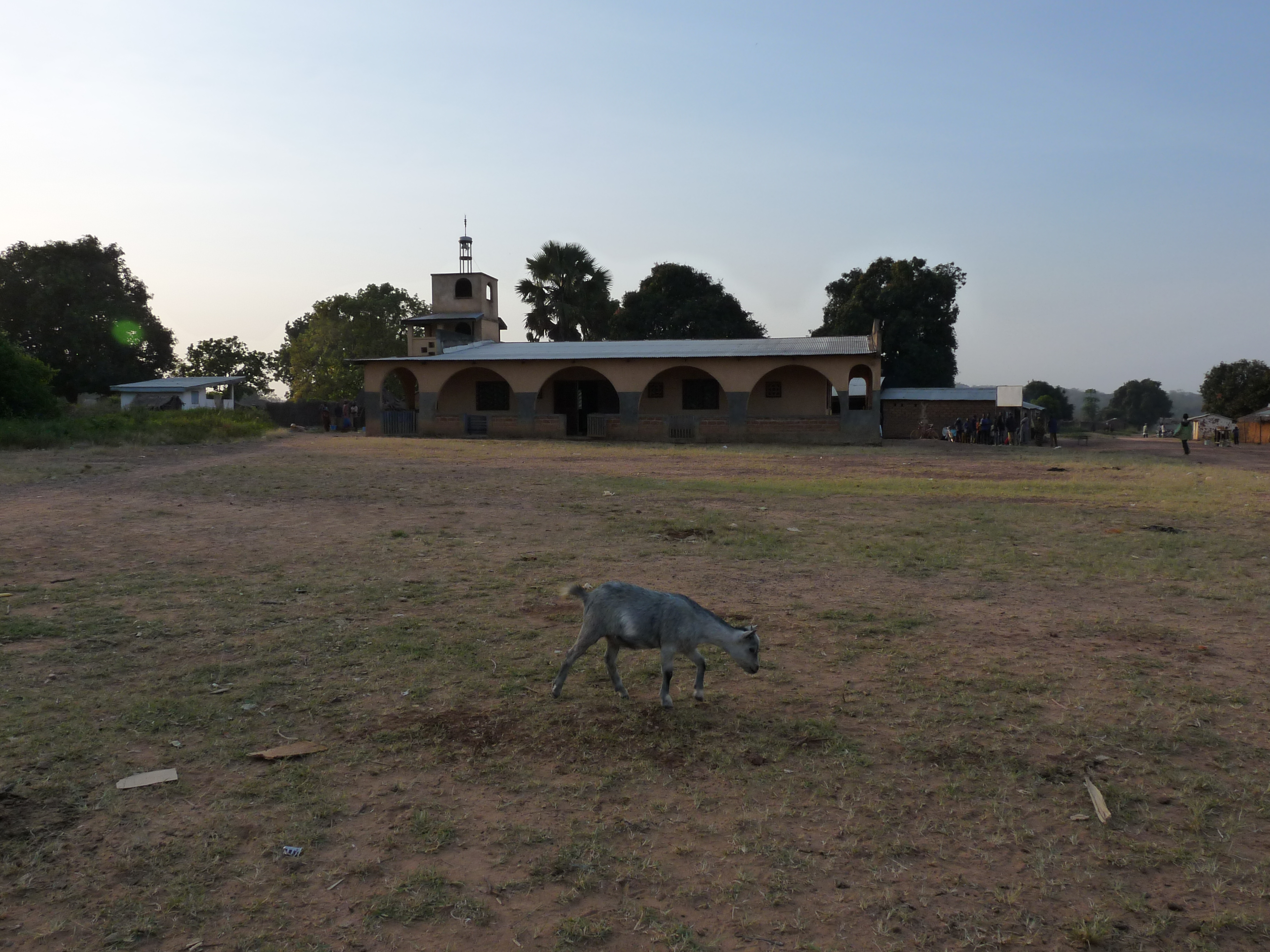 Mosquée de Yéléwa, dans la commune d'élevage de Niem-Yéléwa, dans la préfecture de la Nana-Mambéré, en Centrafrique.